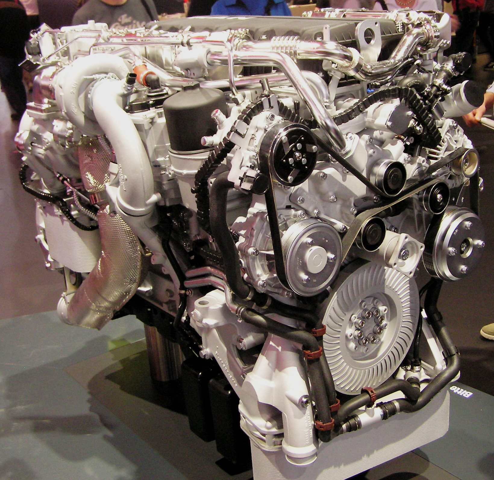 MAN Sechszylinder Dieselmotor, Typ D3876